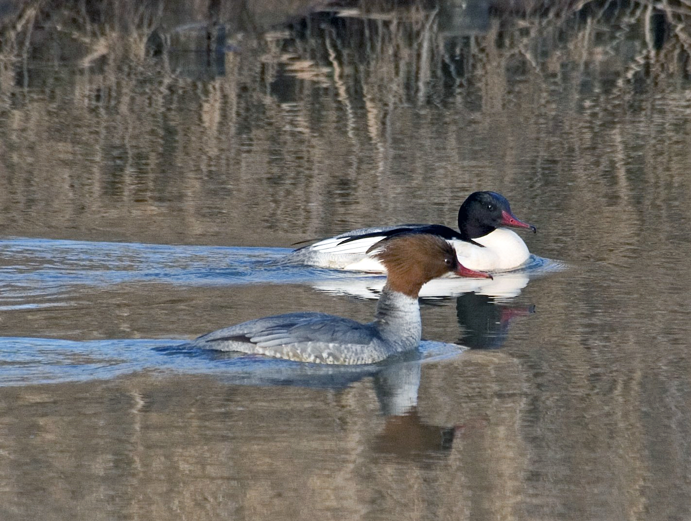 Gänsesäger-Paar auf der Fulda, Nähe Rotenburg a.d.Fulda